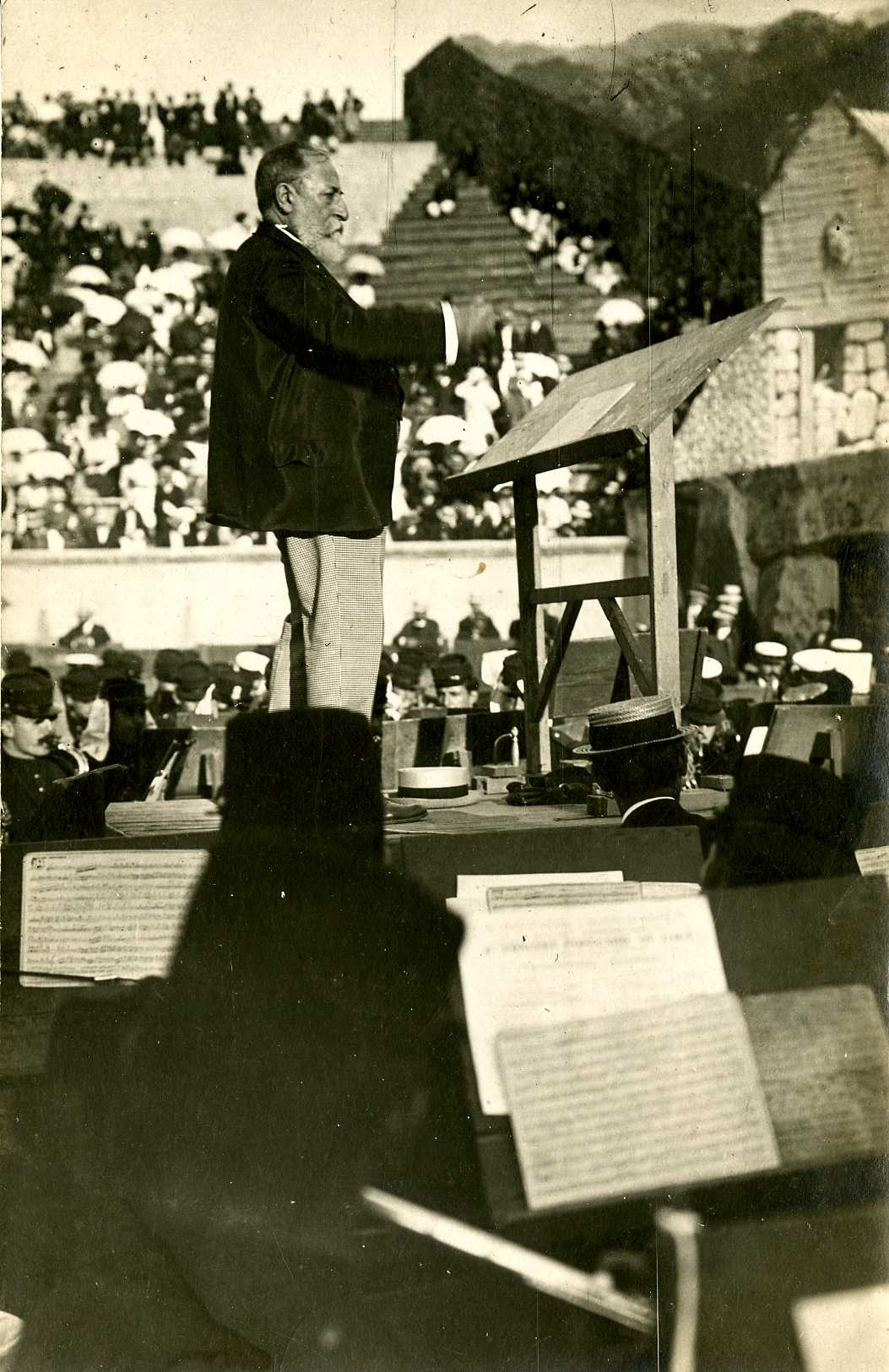 Carte postale éditée en 1898 lors de la représentation de l'opéra Déjanire au Théâtre des Arènes, à Béziers, sous la direction de Camille Saint-Saëns.